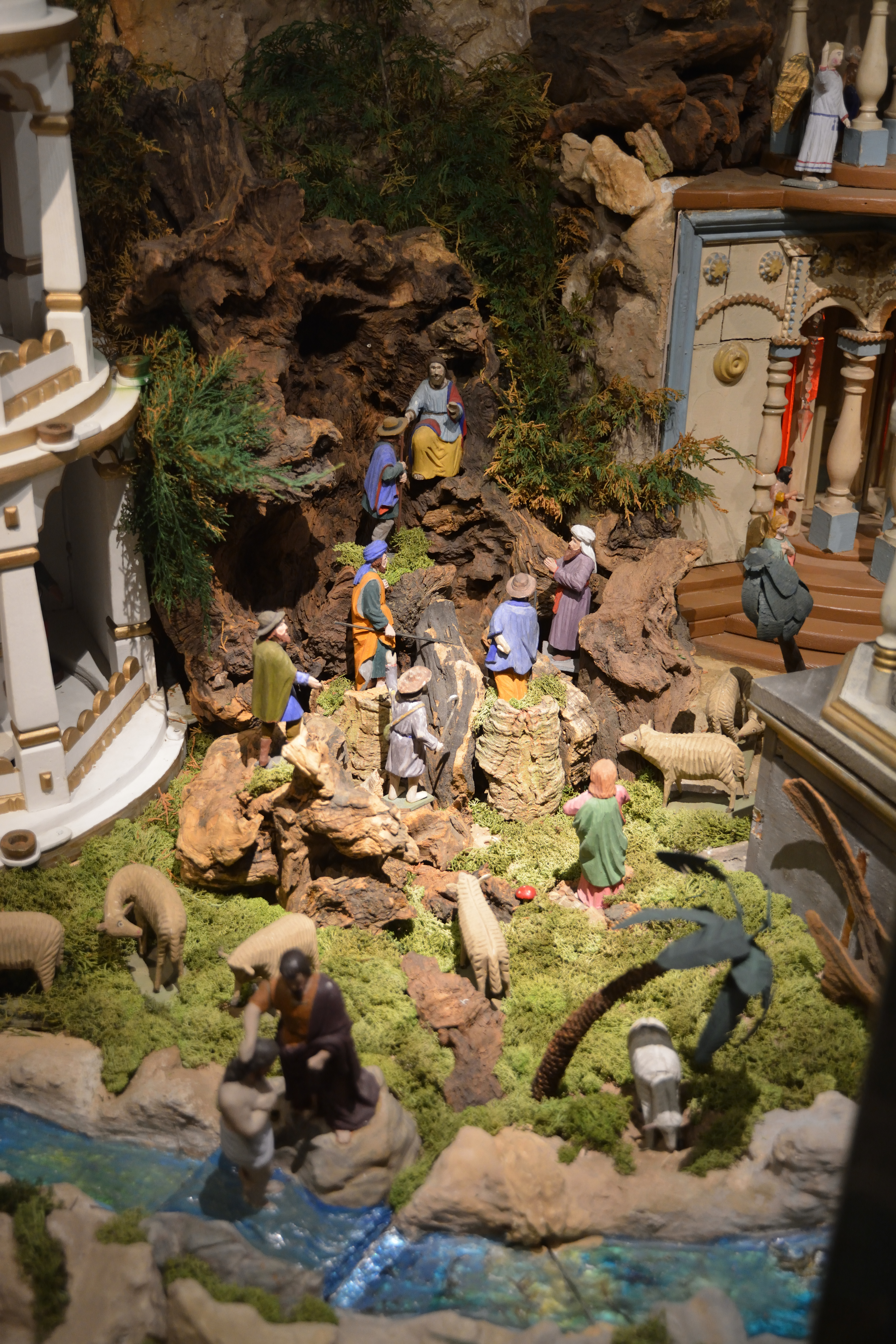 Impressionen aus dem Museum Europäischer Kulturen in Berlin. Ausstellungsraum: Der mechanische Weihnachtsberg aus dem Erzgebirge [1][2]